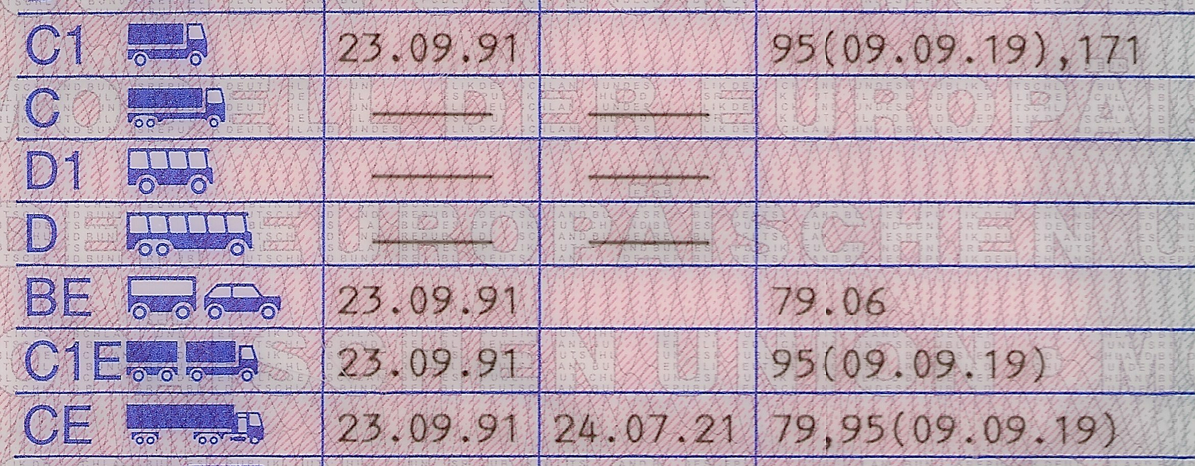 Schlüsselzahlen im EU-Kartenführerschein in Spalte 12 (ganz rechts), z.B. "95"